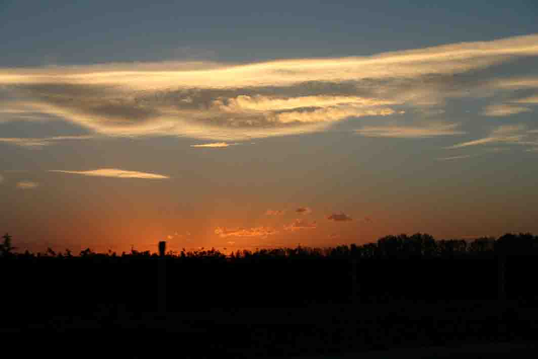 Sonnenuntergang Foto: Moritz Kaschewski